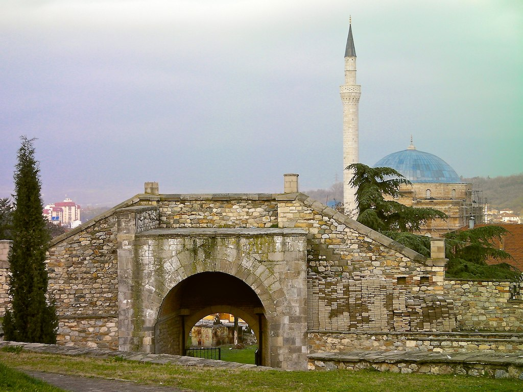 Skopje Fortress